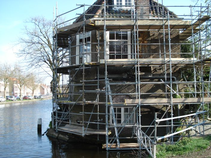 In 2008 is begonnen met een grote restauratie aan de toren. Hierbij stond de toren rondom in de steigers.